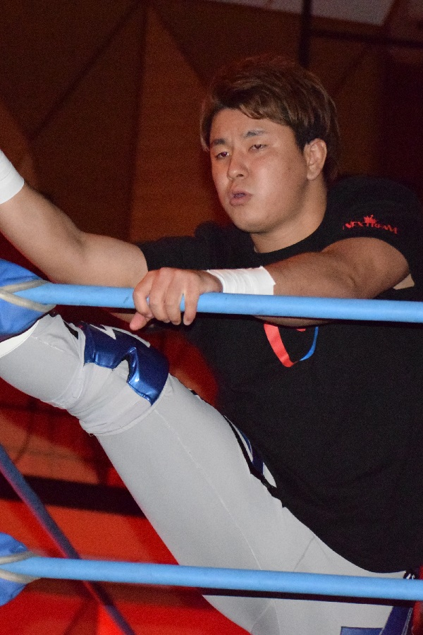 2018年12月6日 アゼリア大正 「2018 世界最強タッグ決定リーグ戦」 宮原健斗